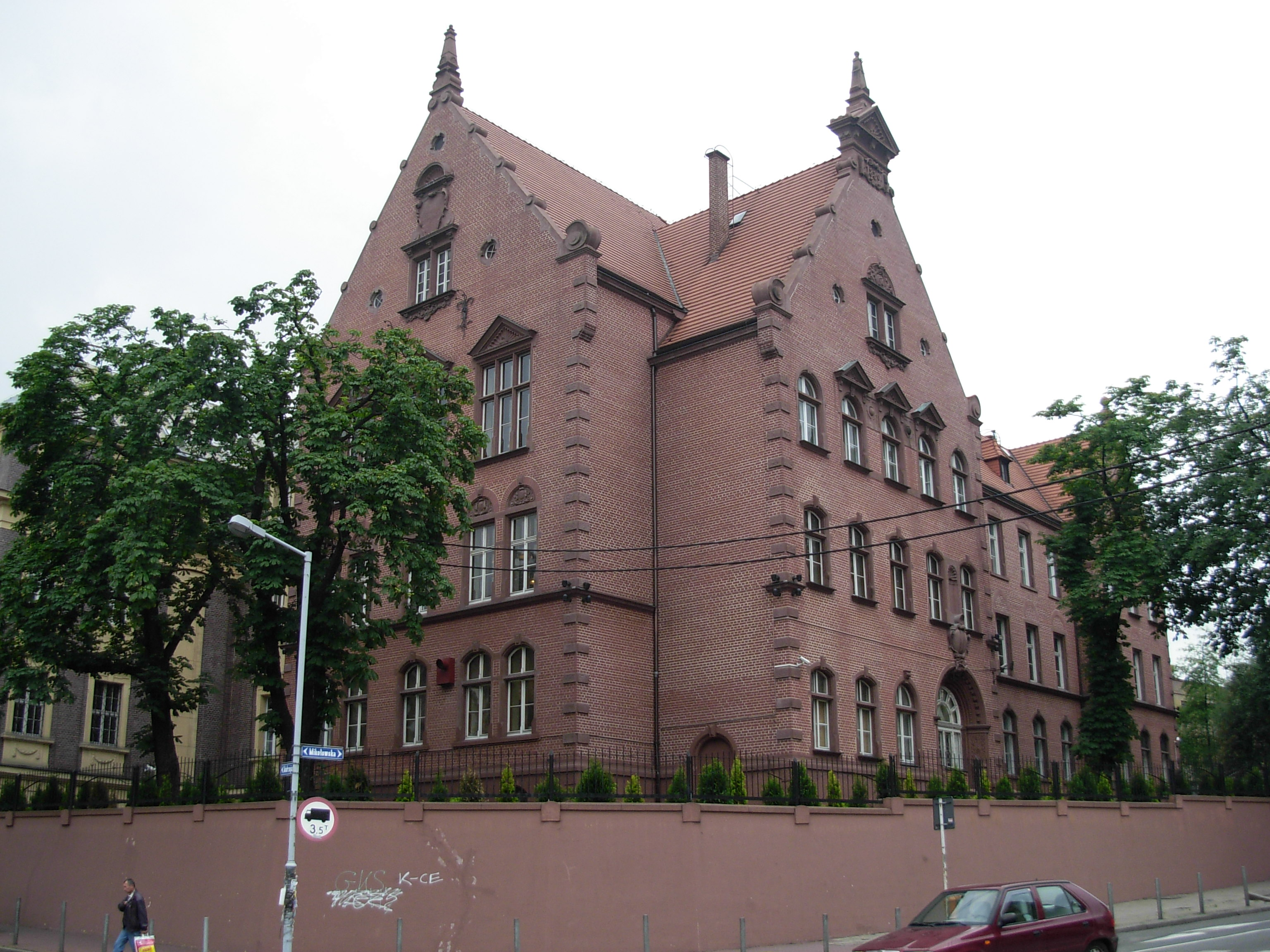 Katowice, ul. Andrzeja 16-18 - zespół budynków byłego Sądu Wojewódzkiego (obecnie Sądu Okręgowego) (zabytek nr A/1663/97)